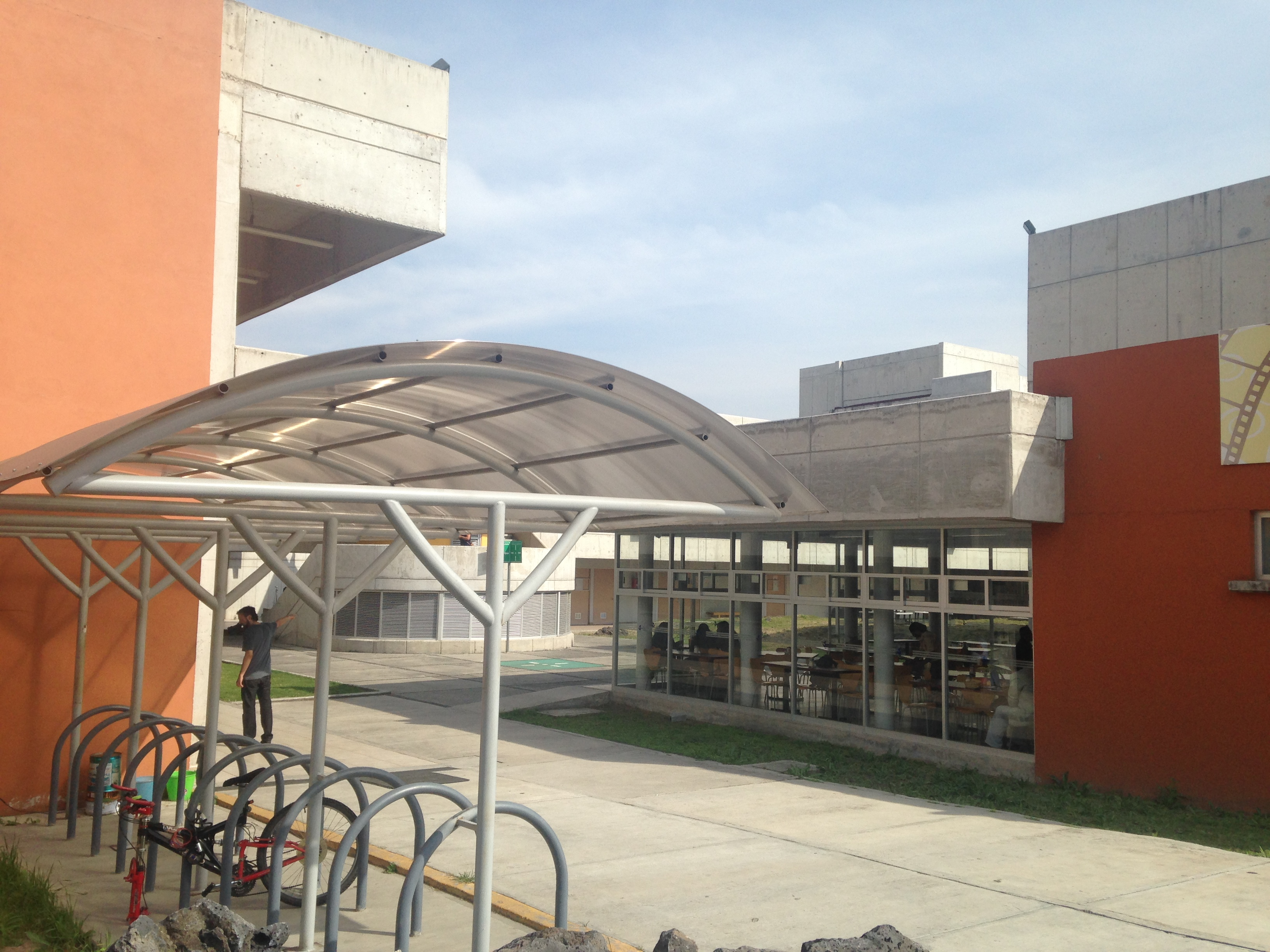 Entrada al Centro Universitario de Estudios Cinematográficos, Ciudad Universitaria, UNAM.